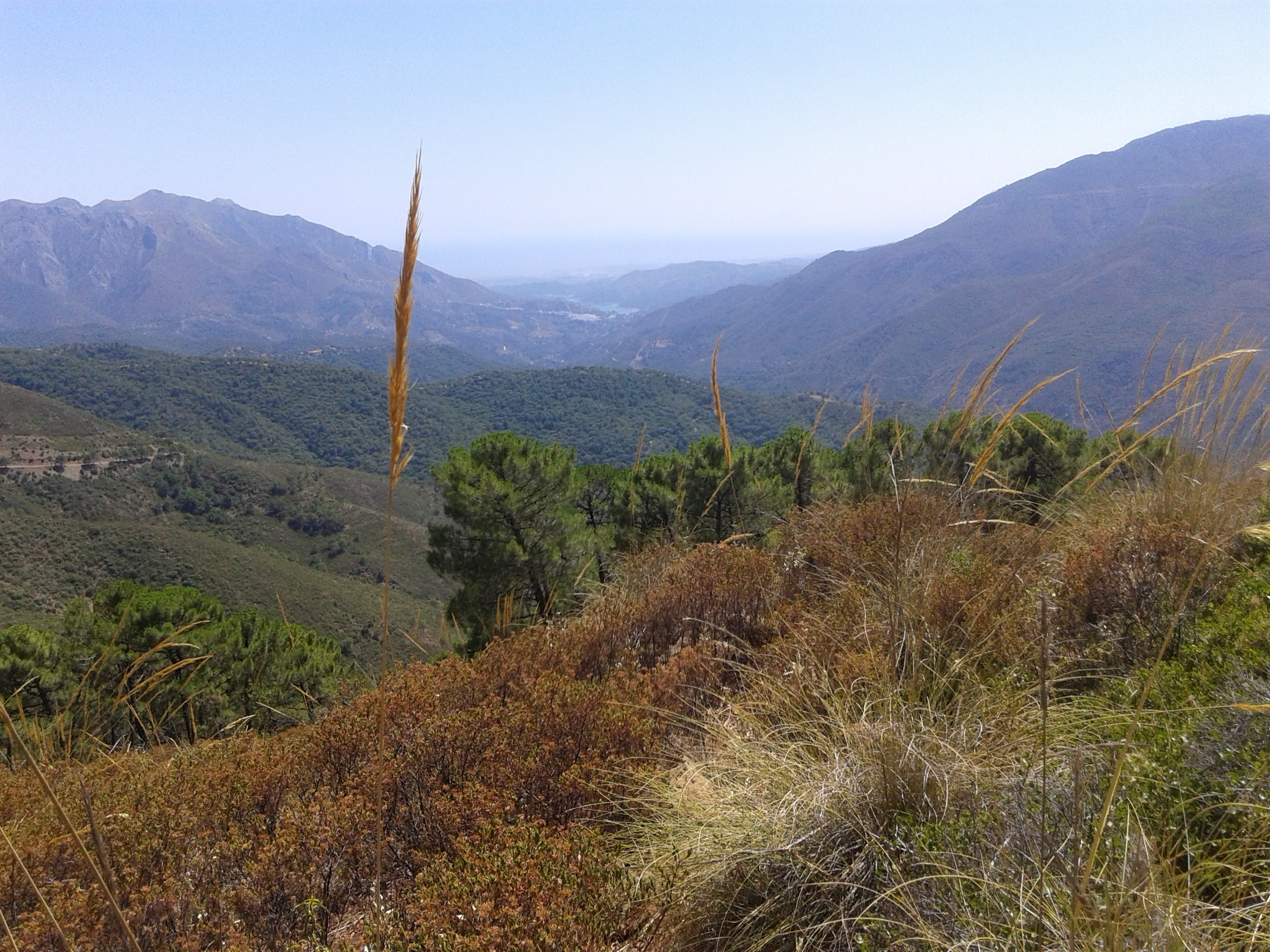 Istan, Embalse de la Concepción y San Pedro Alcantara desde la Sierra de Tolox